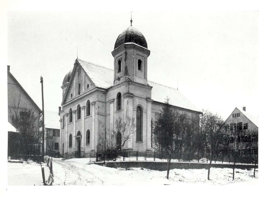 Synagoge Laupheim Nutzungsbedingungen ausdrücklich auch für Wikipedia (siehe: [1]